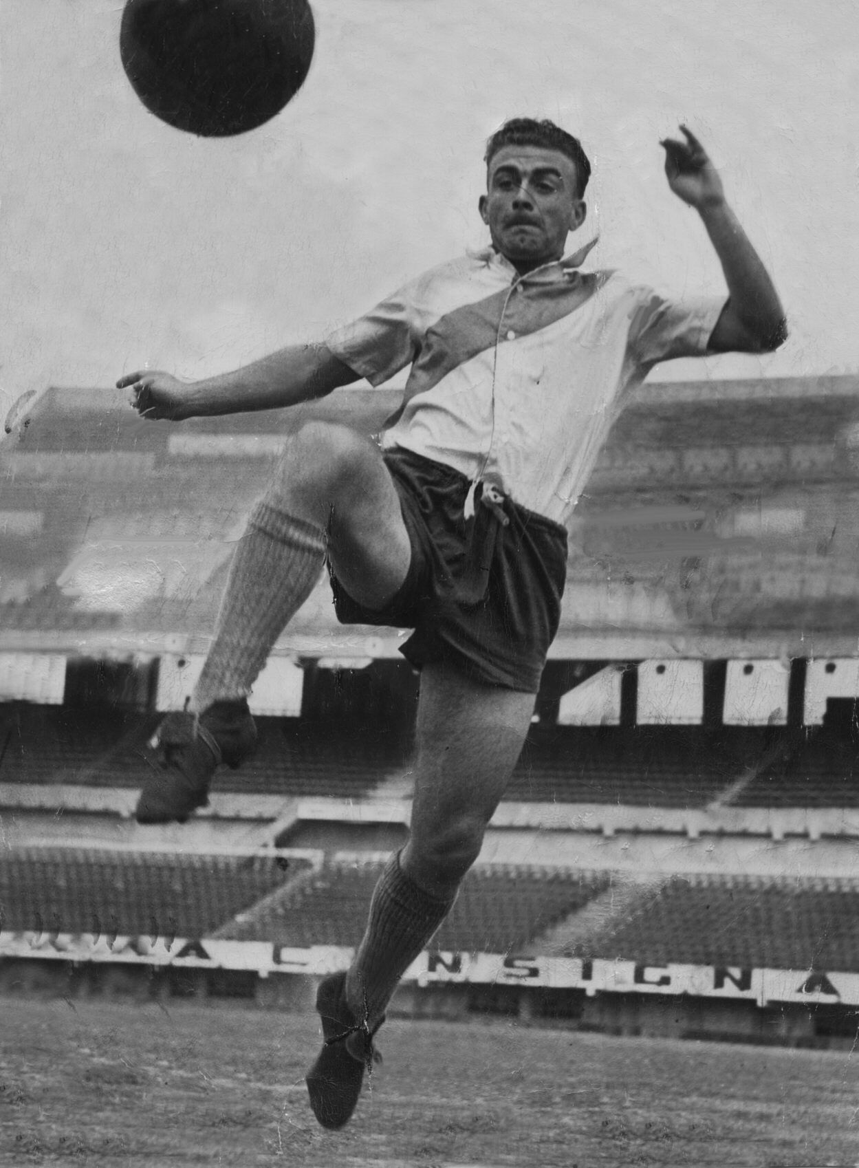 Di Stefano in River Plate